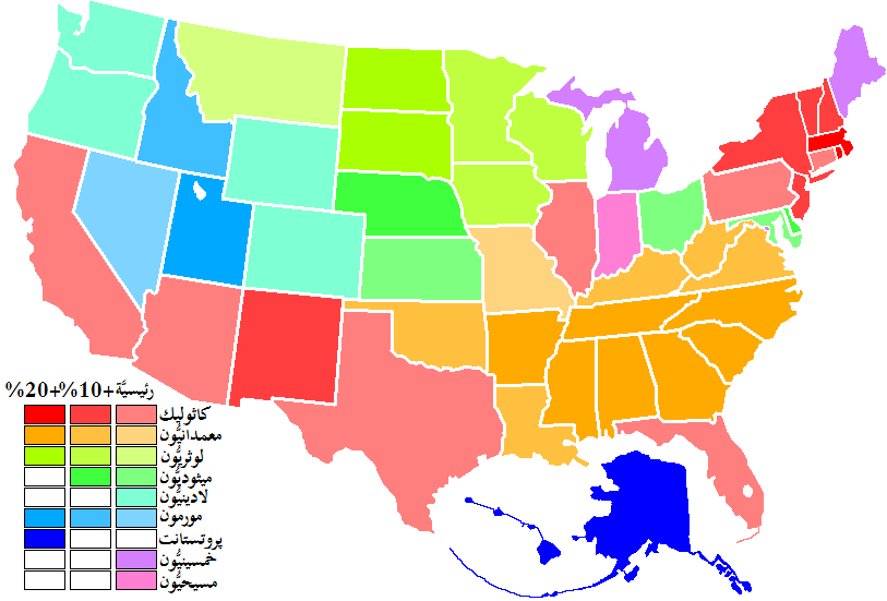 مُختارات لِأعلى نسب الطوائف الدينيَّة المسيحيَّة في الولايات المُتحدة الأمريكيَّة مُقارنةً بِالمُعدَّل الوطني (على سبيل المثال، تصل نسبة الكاثوليك في نيوجيرسي إلى 39% وهي تُشكِّل 16% من نسبة الكاثوليك على المُستوى الوطني).